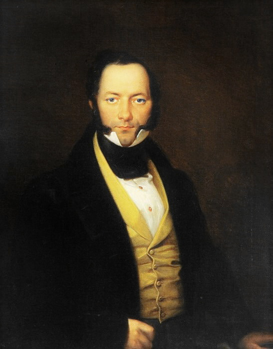 Партрэт Аляксандра Дамініка Радзівіла (Aleksander Dominik Radziwiłł (1810 - 1863). Вільнюская карцінная галерэя